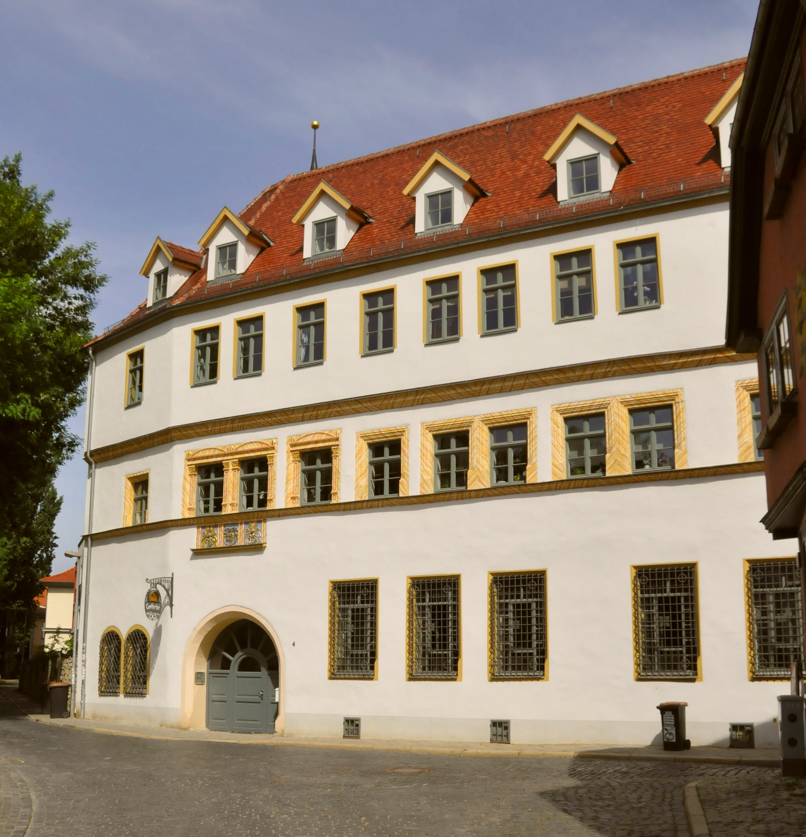 Der Comthurhof in der Comthurgasse - Erfurt, Thüringen, Deutschland